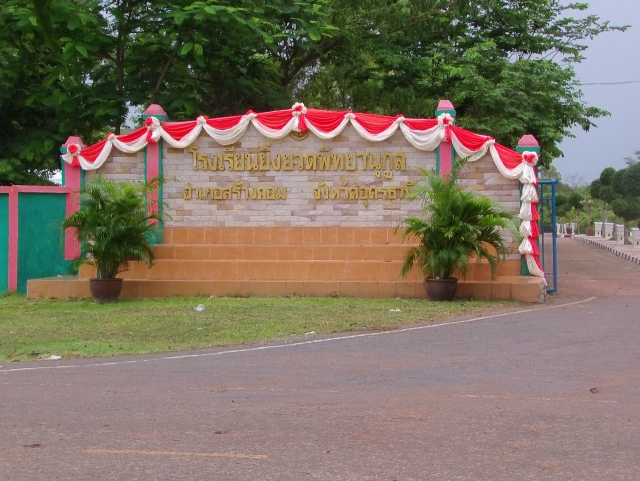 ป้ายโรงเรียน